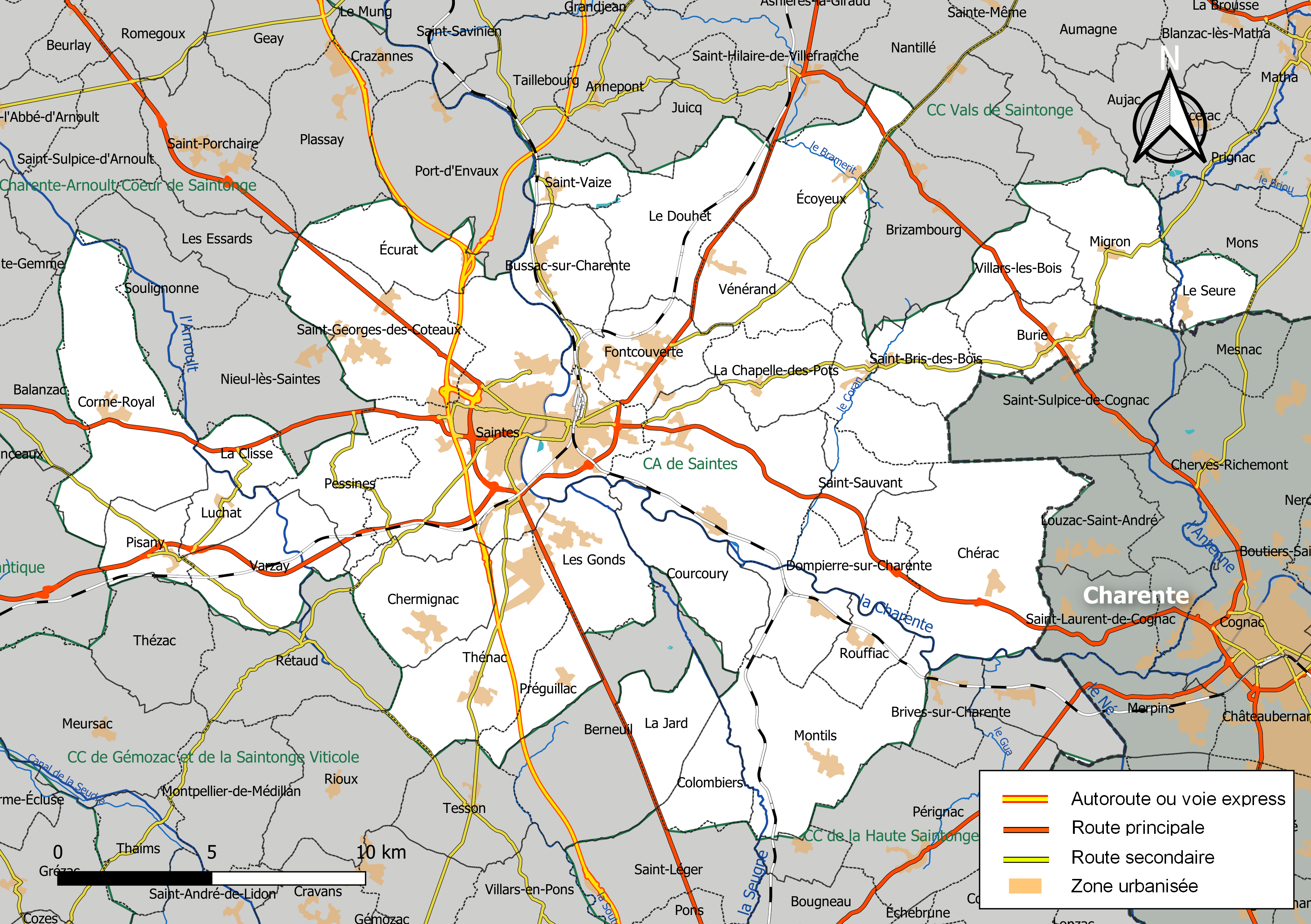 Carte géographique de la Communauté d'agglomération de Saintes, département de la Charente-Maritime, France. Composition au 1er janvier 2019.